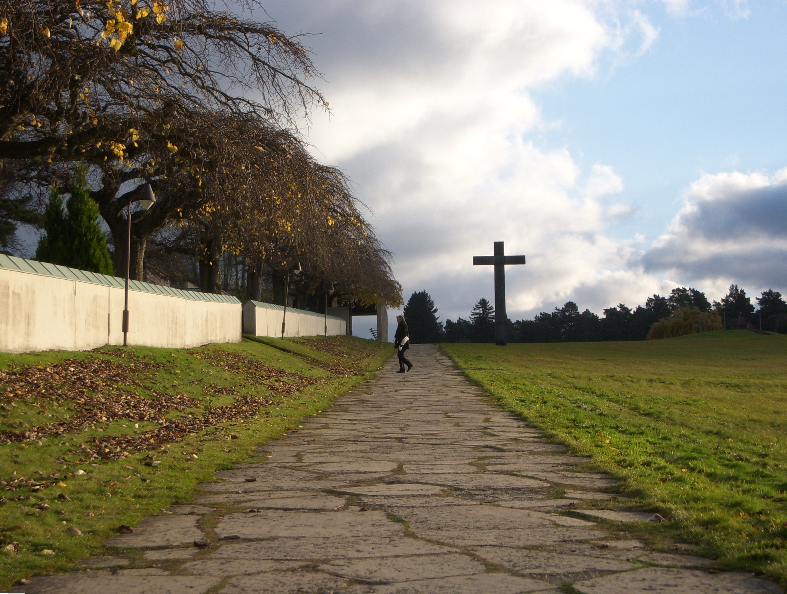 Skogskyrkogården i Stockholm